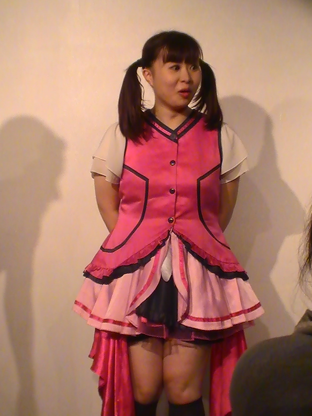 大松絵美 (2017年6月25日)